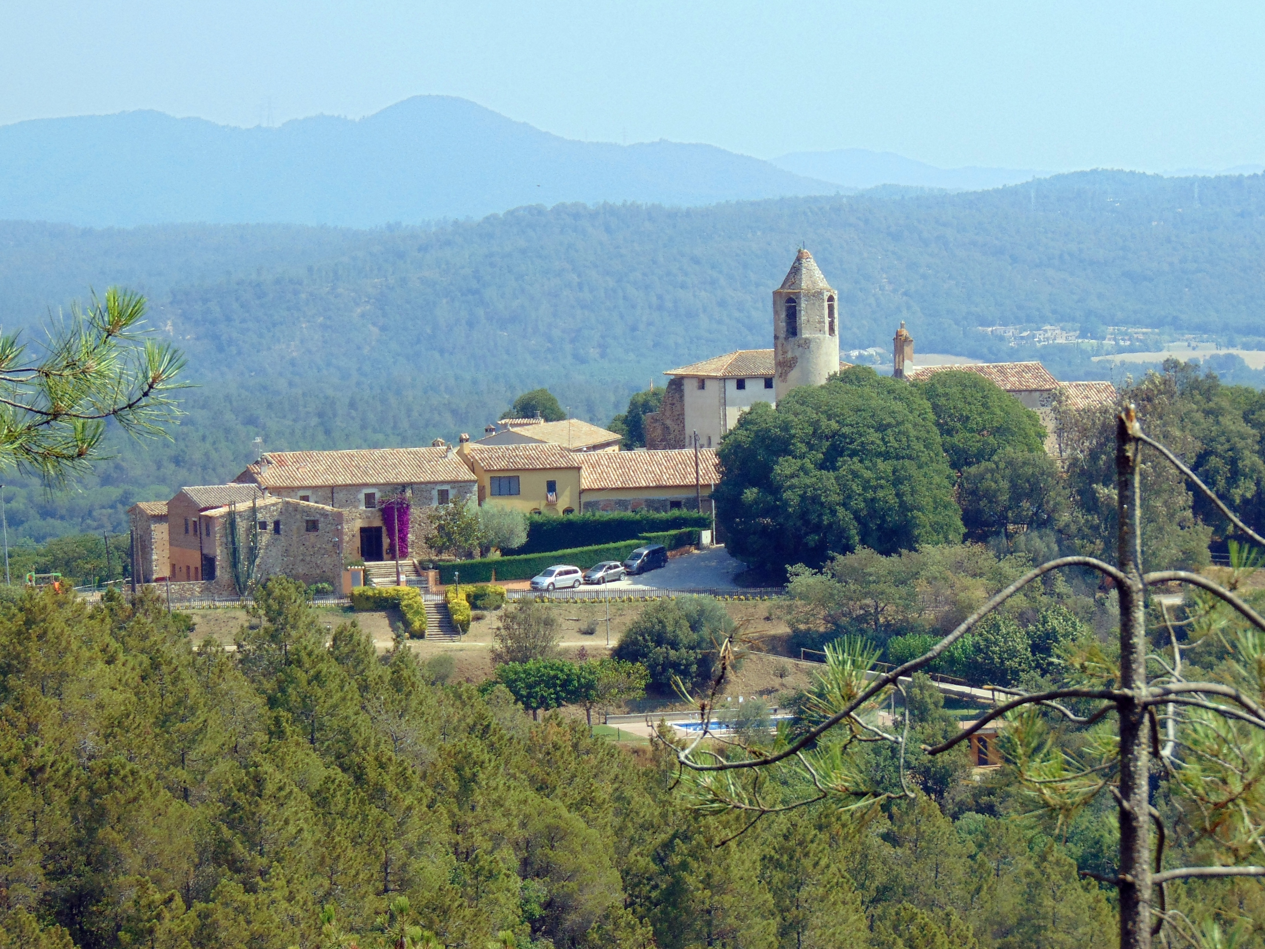 Església de Sant Fruitós (Brunyola)